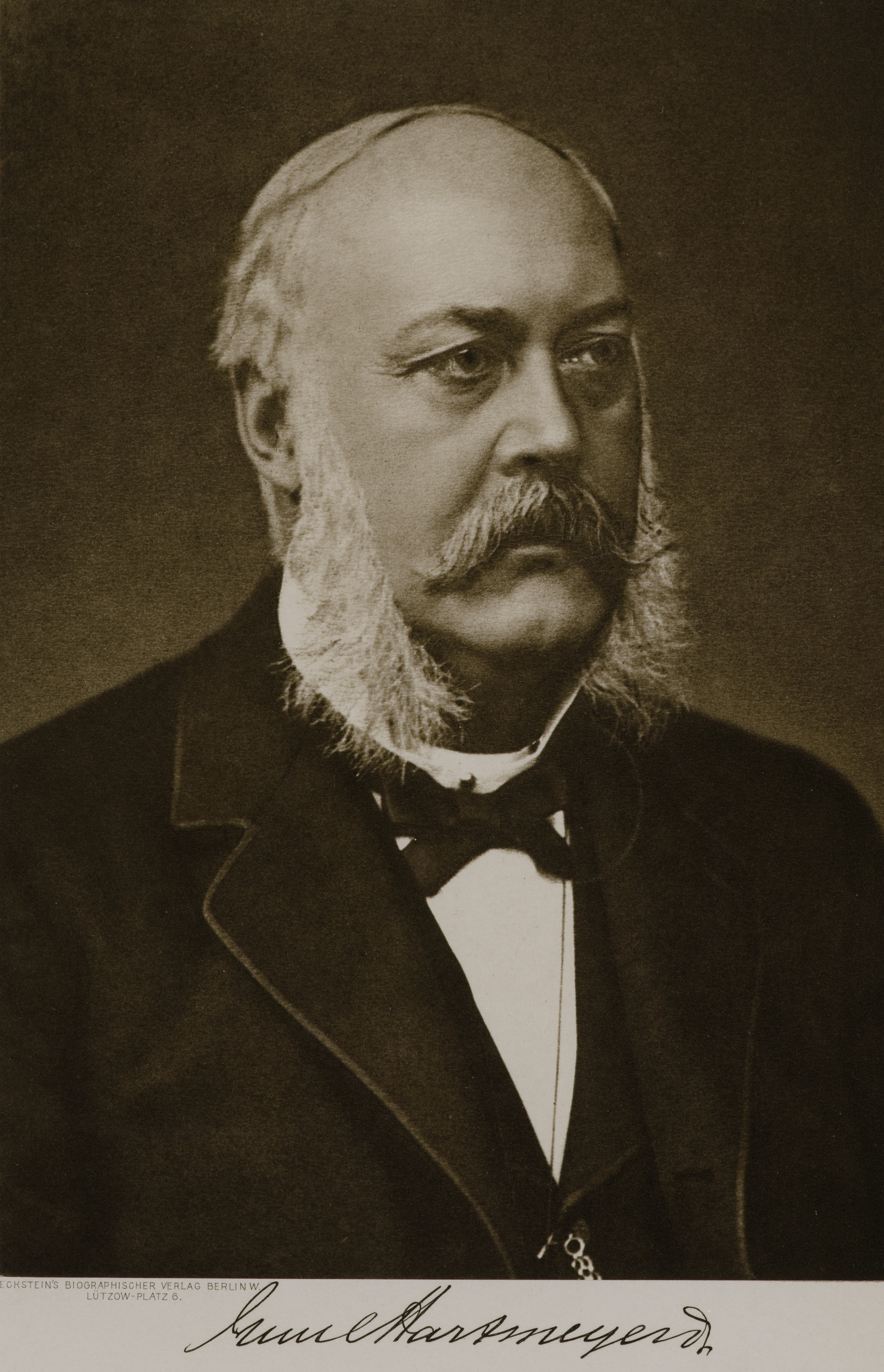 Bildnis von Heinrich Emil Hartmeyer